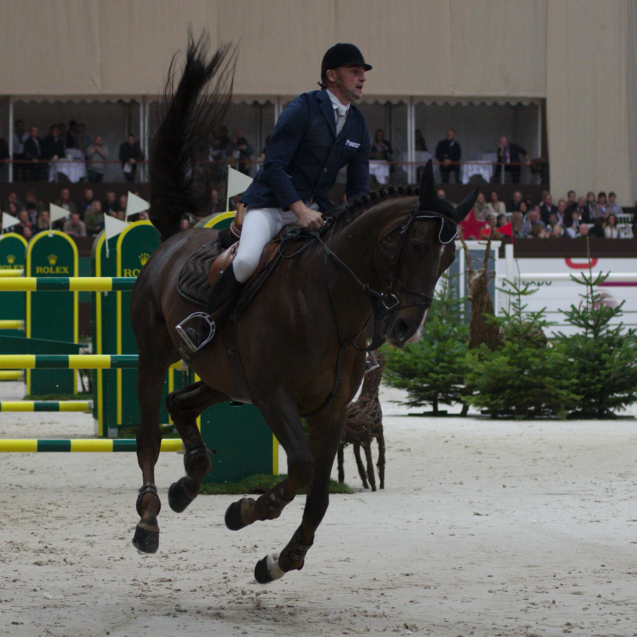 54eme CHI de Genève - 20141213 - Coupe de Genève - Jerome Hurel et Quartz Rouge